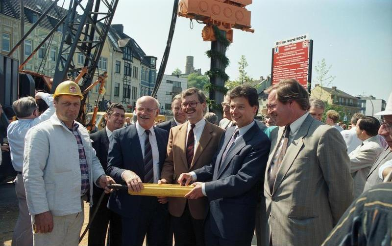 7.5.1988 Rammschlag zum U-Bahn-Bau in Bad Godesberg